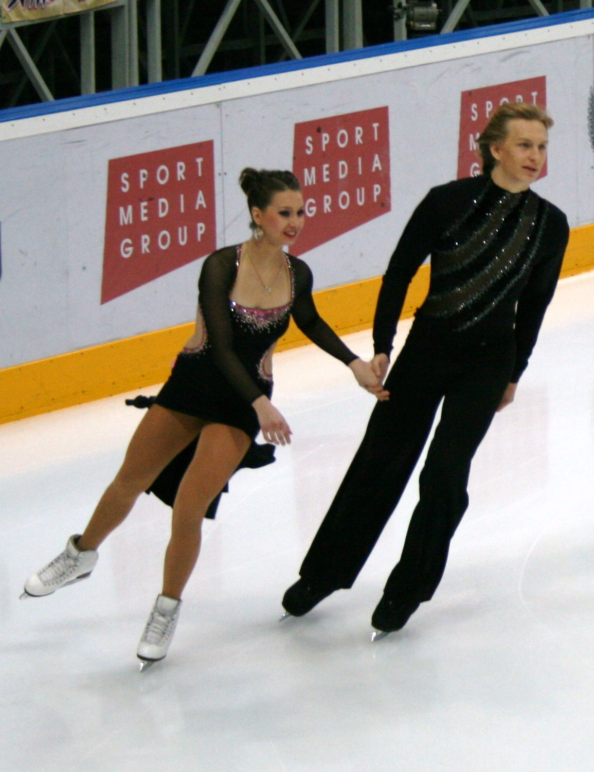 Lucie Myslivečková and Matěj Novák at the 2009 Rostelecom Cup